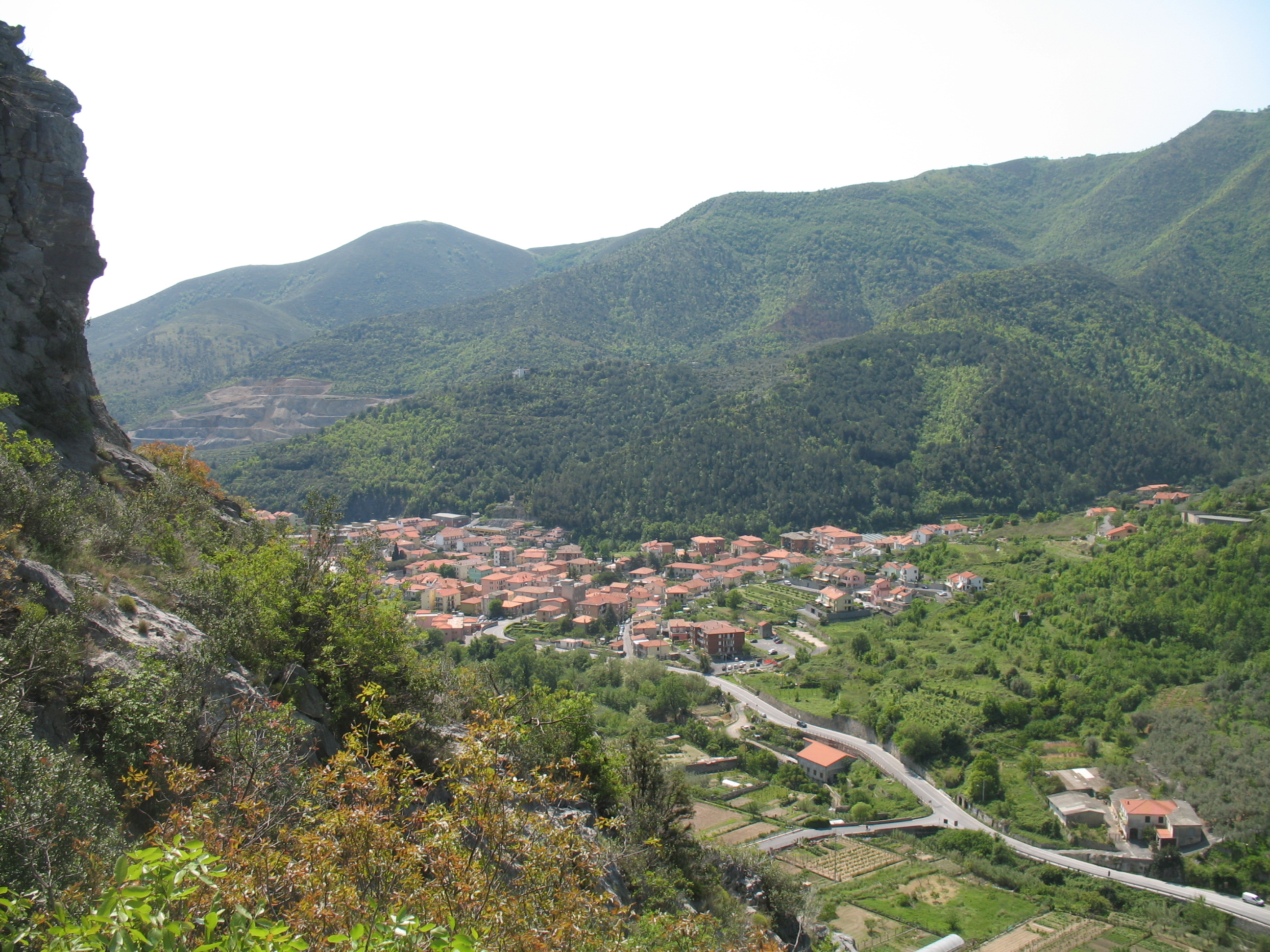 Val Varatella, a Toirano, Savona, Liguria, Italia